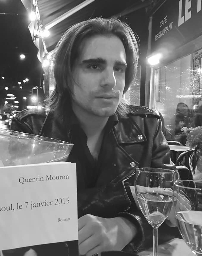 Quentin Mouron en 2019